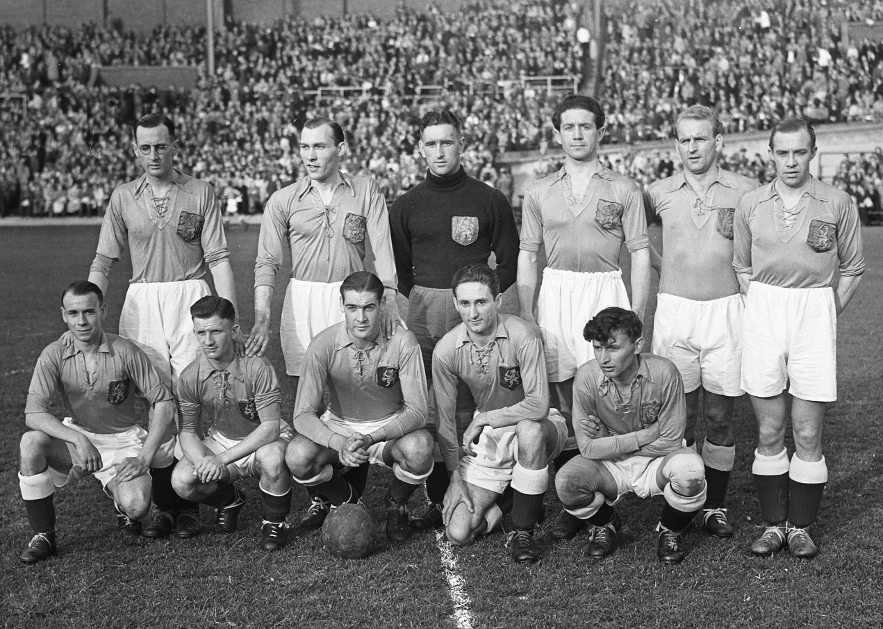 Nederland-Zweden 1-0. Nederlandse Elftal:staand vlnr: Stoffelen, van Bun, Kraak, Terlouw, Schijvenaar, de Vroet (captain); zittend vlnr: van der Tuijn, Rijvers, Roosenburg, Wilkes, Lenstra.